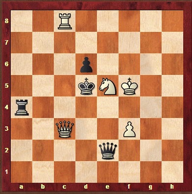 El mate Anastasia se caracteriza por la combinación del caballo que cierra los escapes y el ultimo movimiento de una torre o dama que ataca en columna.